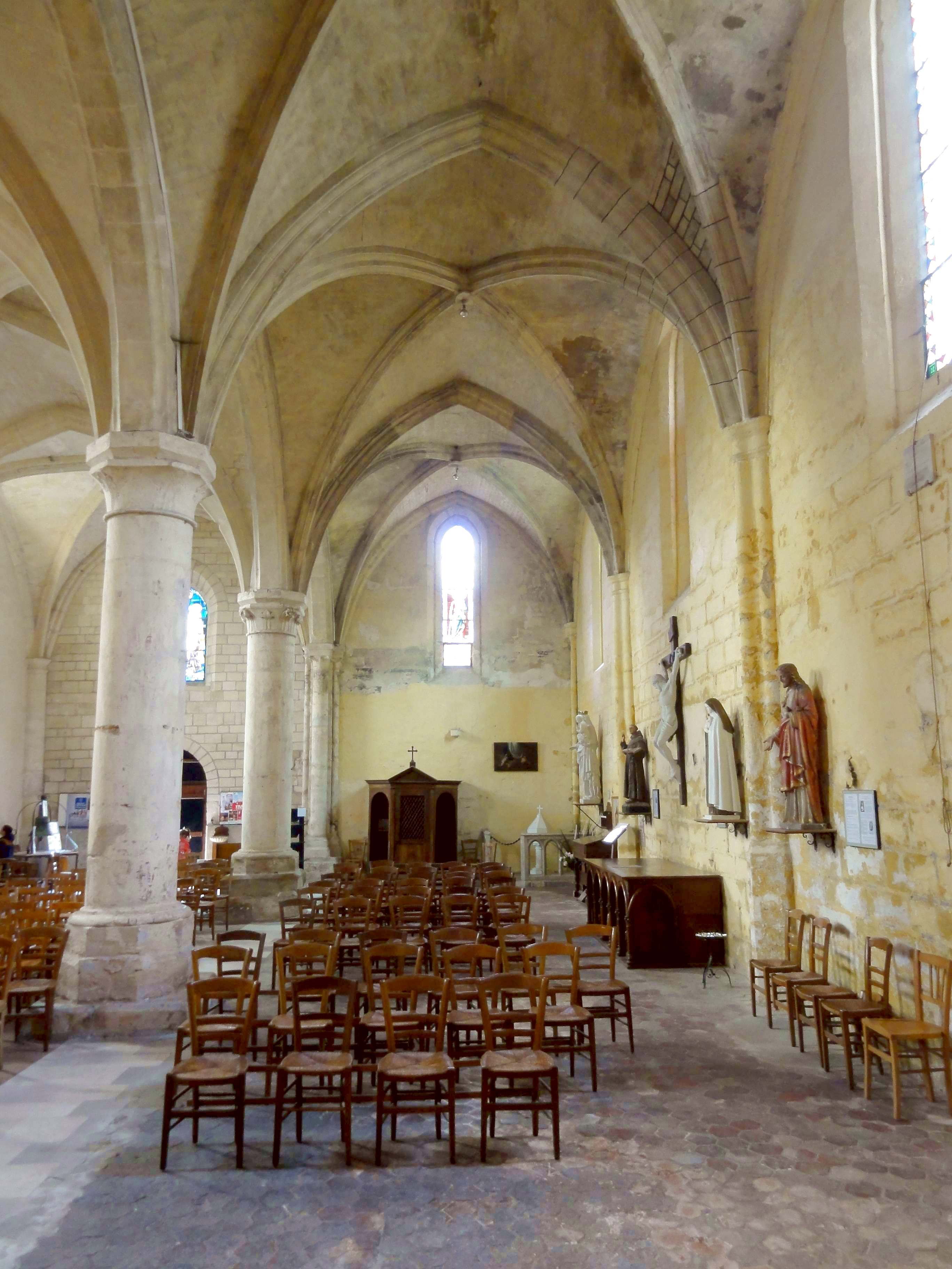 Intérieur de l'église - voir titre.